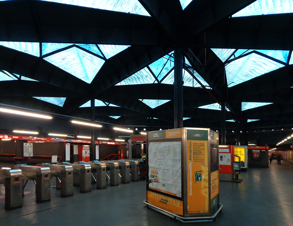 Stazione di Amendola della metropolitana di Milano, il mezzanino.